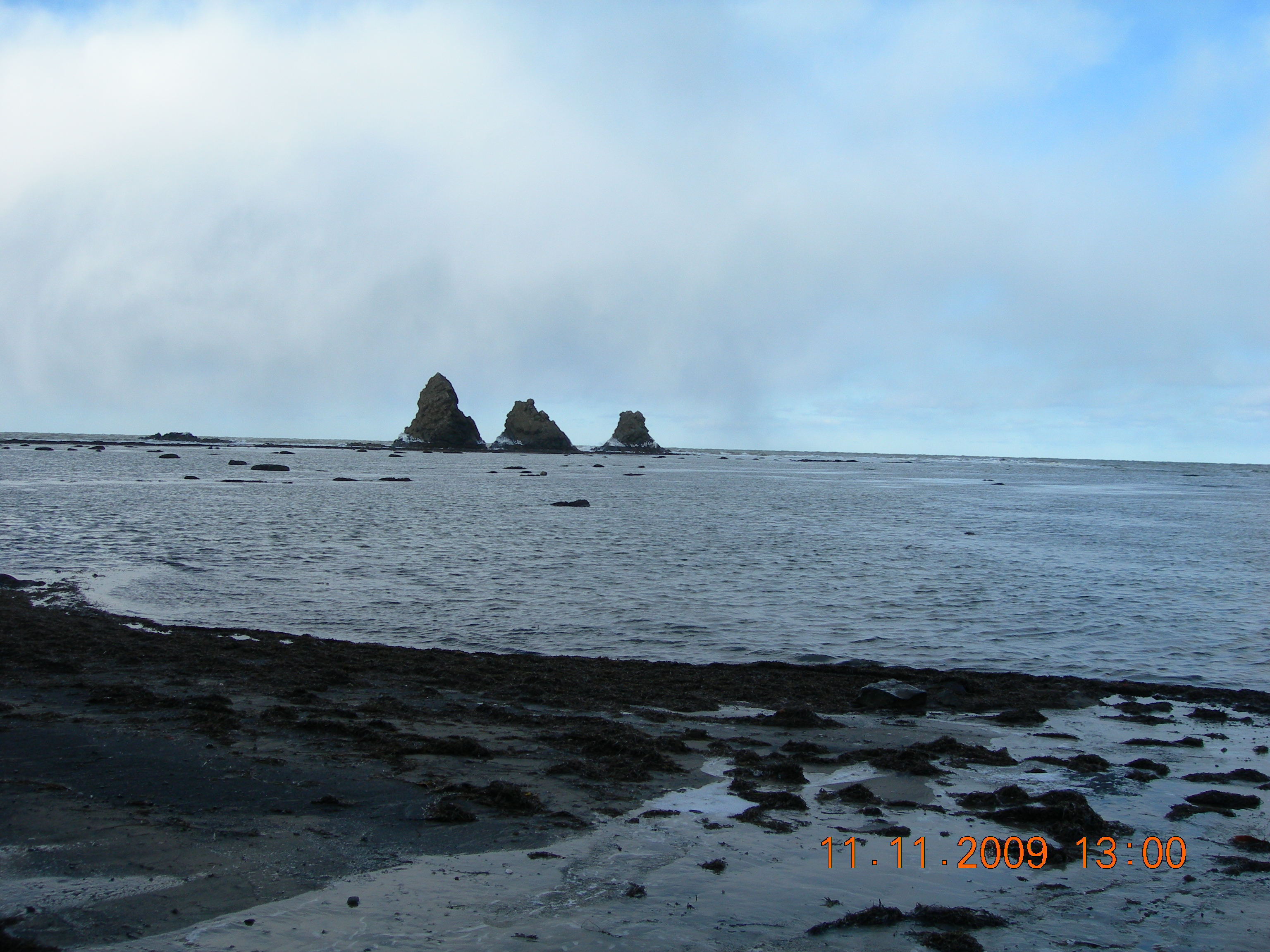 Скалы "Три брата". Александровск-Сахалинский. Татарский пролив.О. Сахалин.